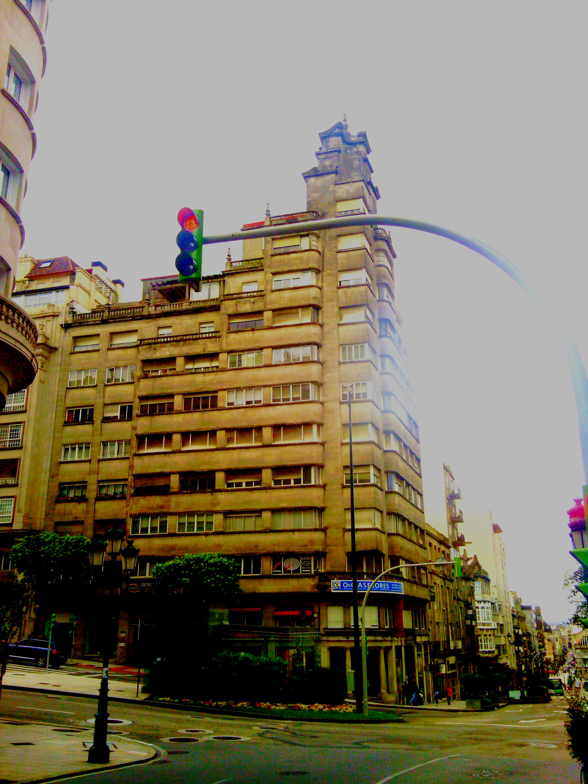 En esta imagen del Edificio Albo, tomada desde Urzaiz, podemos ver la fachada principal.